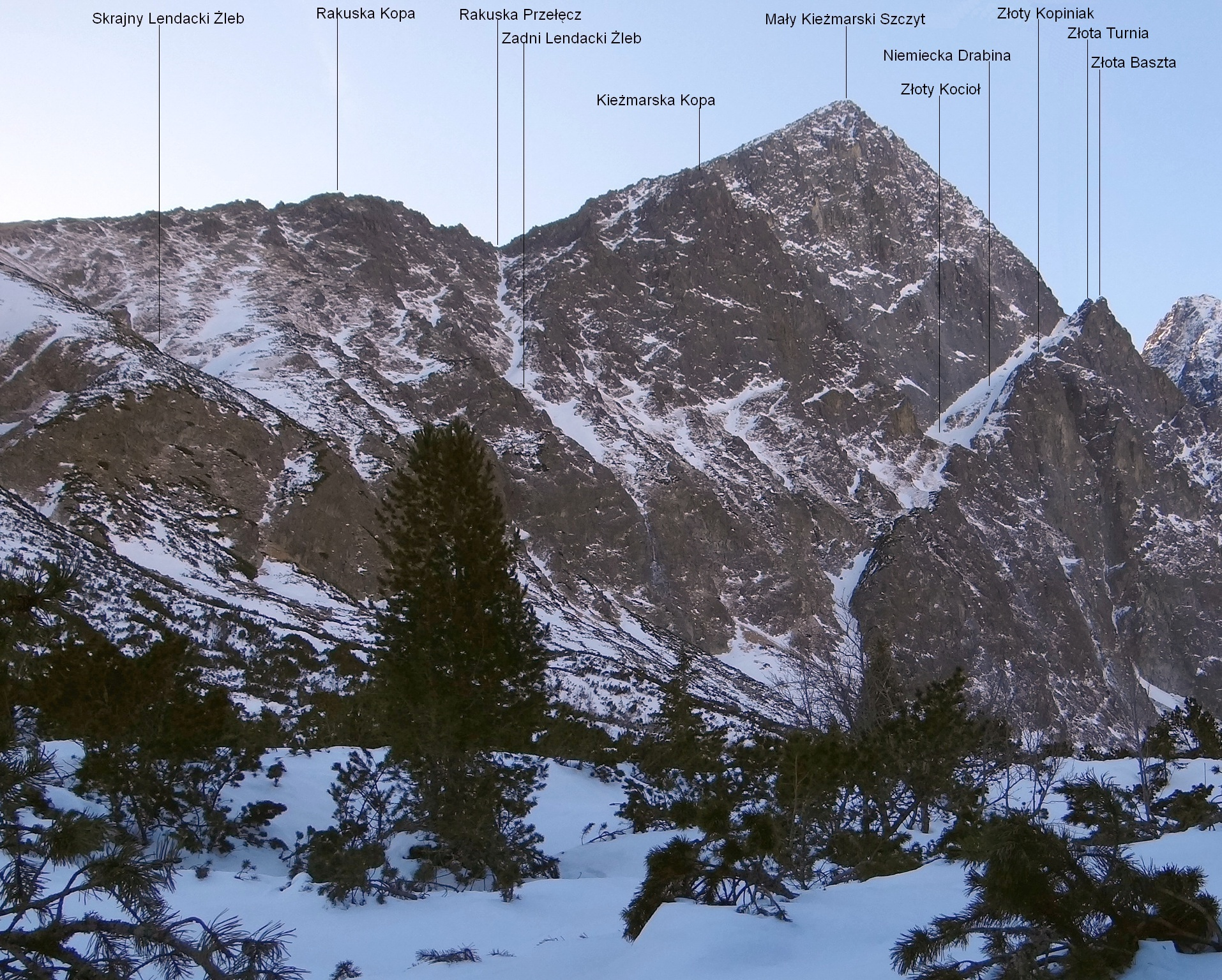 Malý Kežmarský štít (Mały Kieżmarski Szczyt)